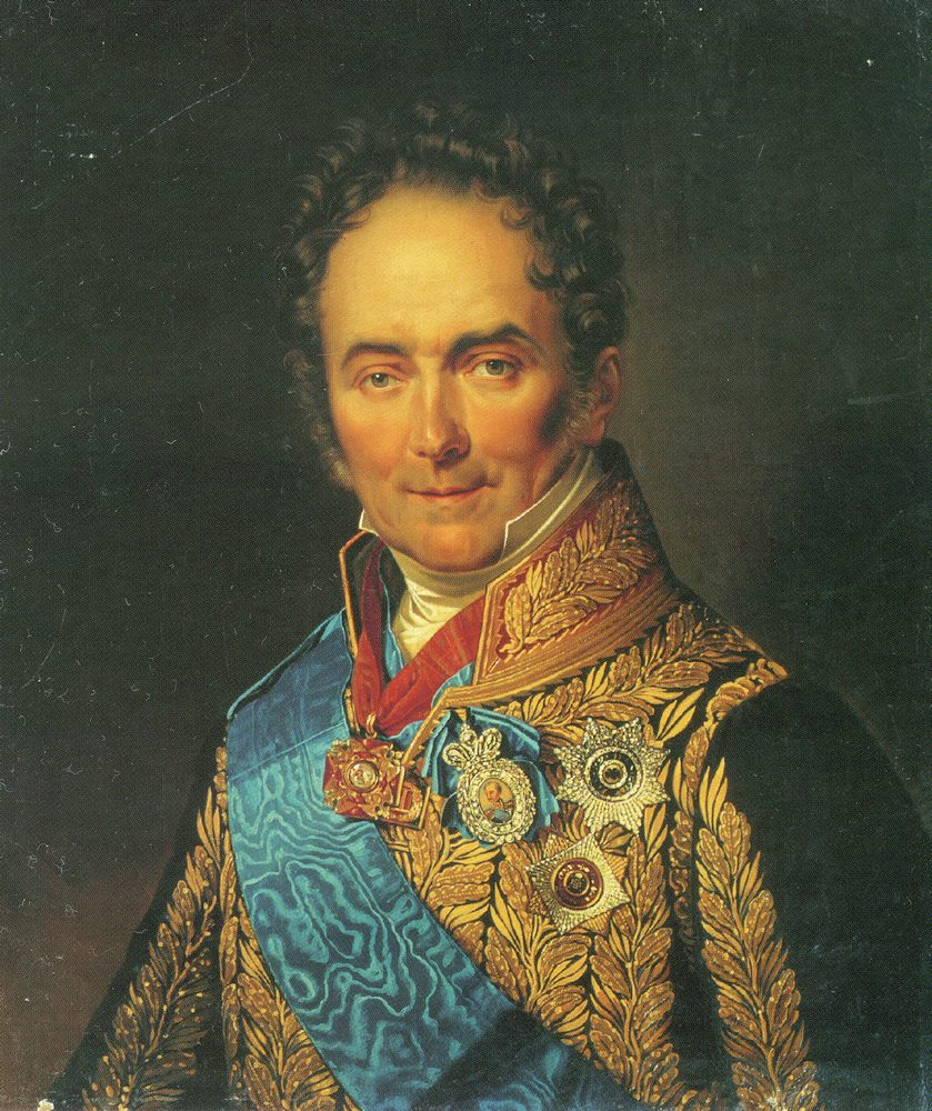 Виктор Павлович Кочубей (11.11.1768 - 3.06.1834)